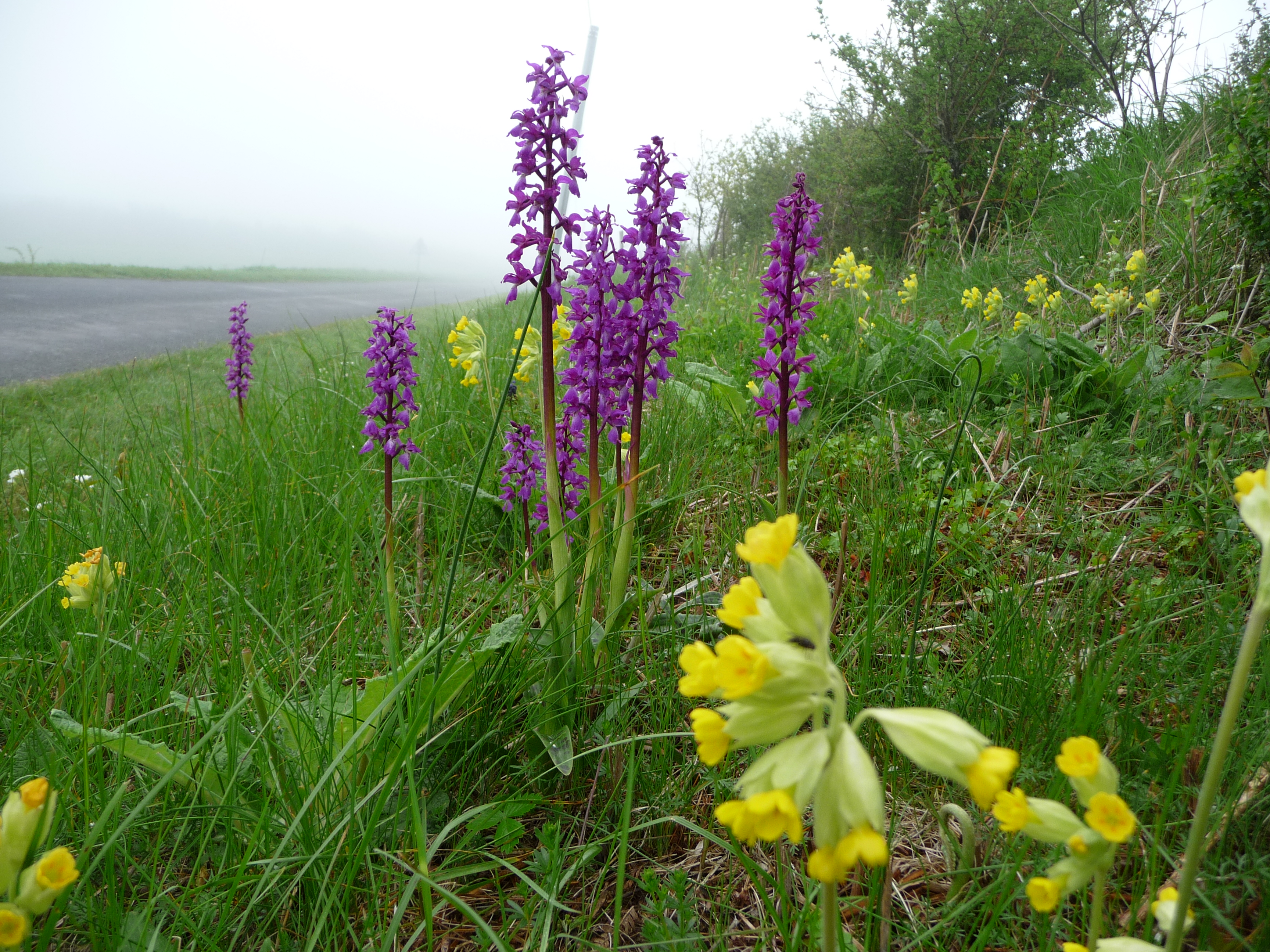 Coucou et orchidée sur la montagne (larzac). Massif central, Aveyron.